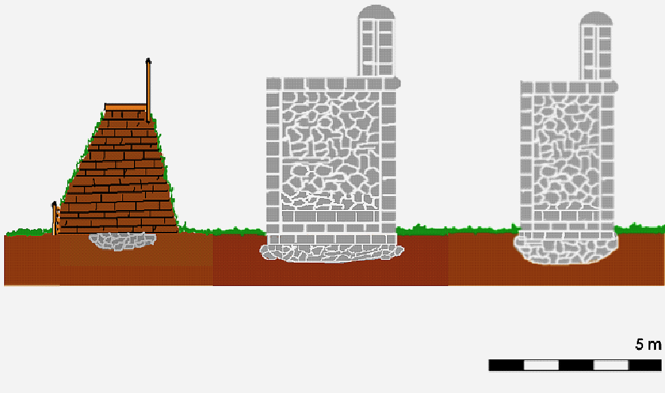 Konstruktionsmerkmale des Hadrianswalls (GB), 2. Jahrhundert n.hr.